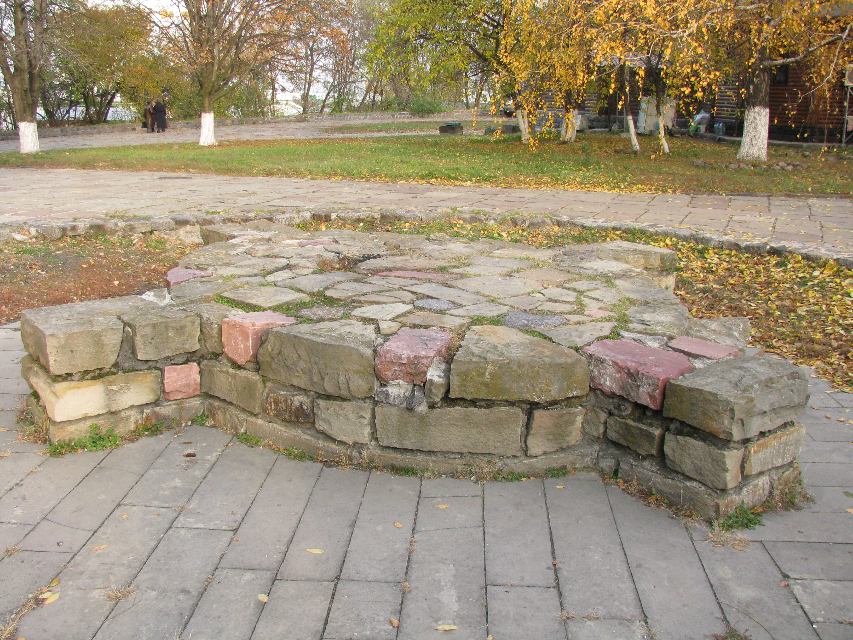 Язичницьке капище VII — I пол. Х ст.